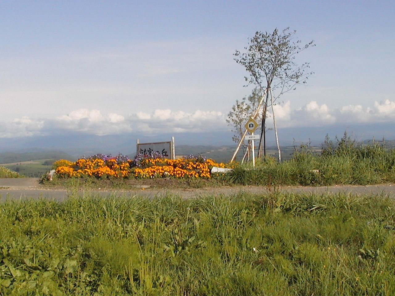 就実の丘の看板を撮影